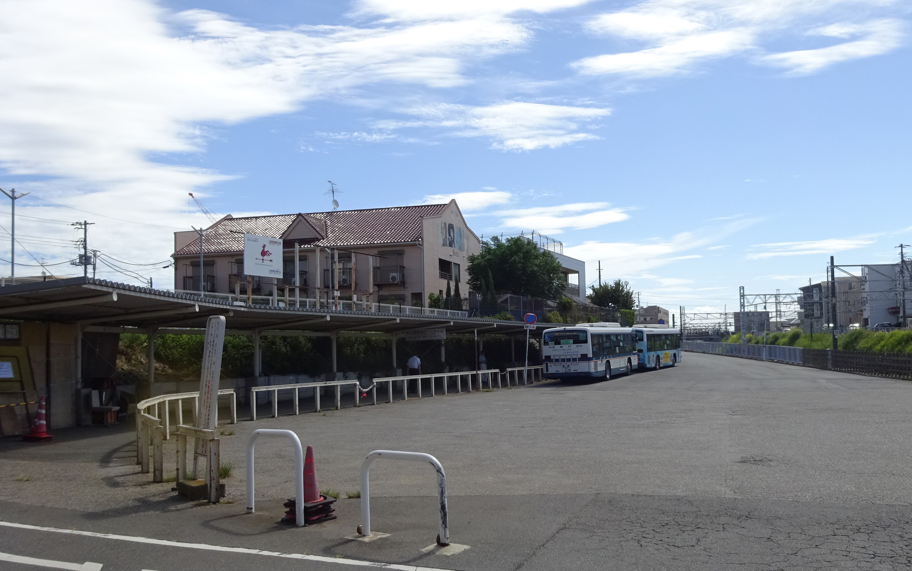 東中山駅北口にあるバスターミナル